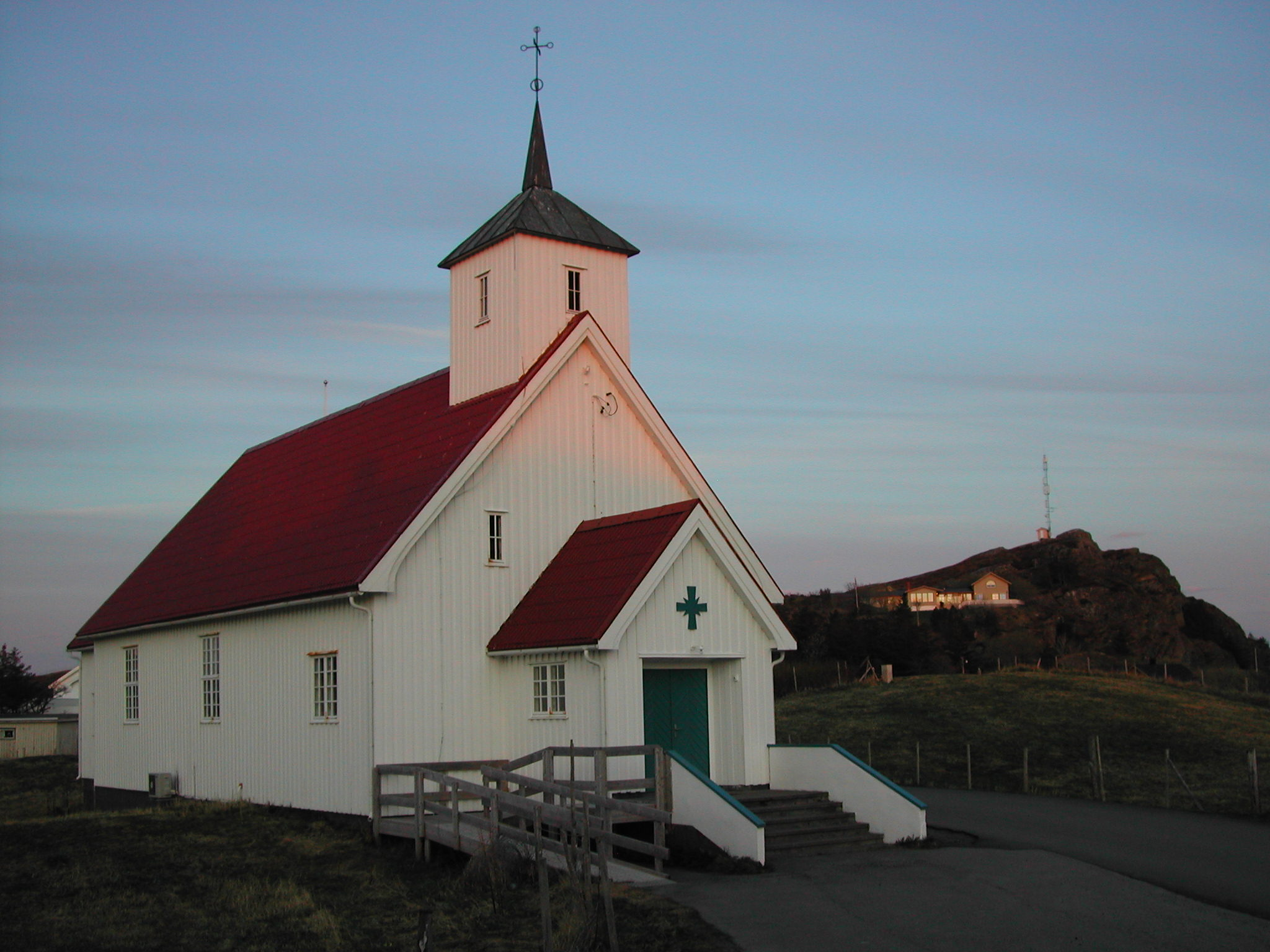 Lovund kapell